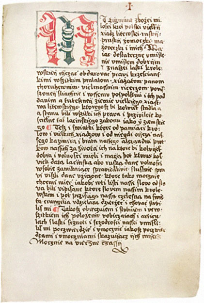 Беларуская (тарашкевіца): Статут Вялікага Княства Літоўскага. Альшэўскі сьпіс